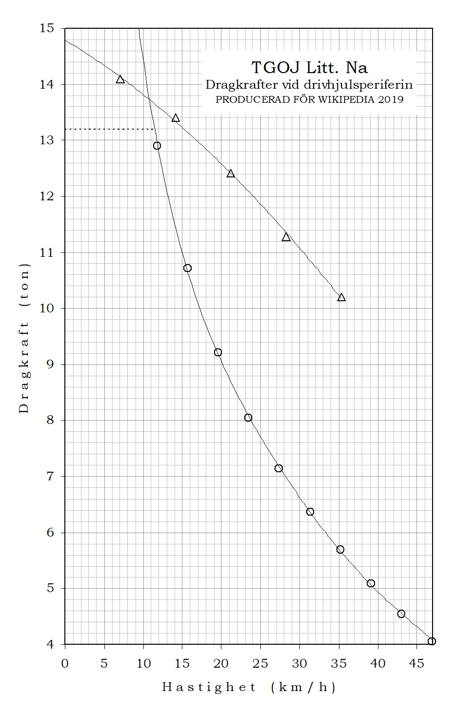 Dragkraftskurva för TGOJ Littera Na (ånglok).